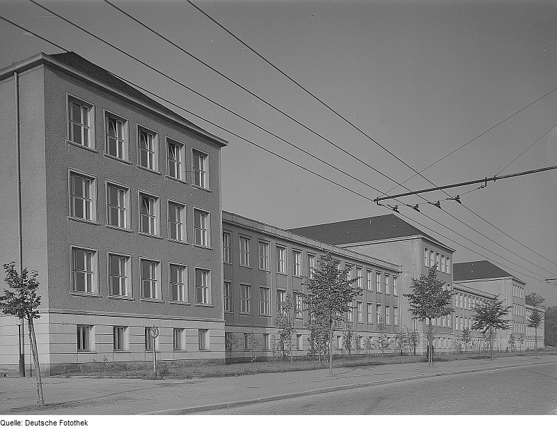 Original image description from the Deutsche FotothekDresden. Technische Universität, Willers-Bau Oberleitungen der Dresdner O-Bus-Linie C am Zelleschen Weg